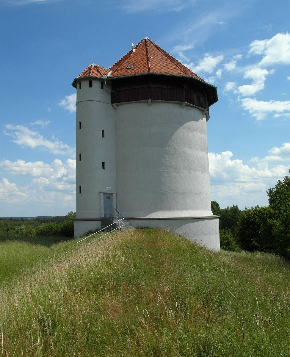 Wieża kompensacyjna na rurociągu doprowadzającym wodę do elektrowni w Bielkowie.